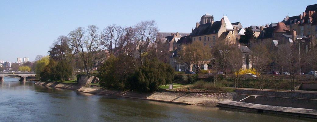 Vue sur la rive gauche de la Sarthe au Mans, près de l'ancien quartier Saint-Nicolas.